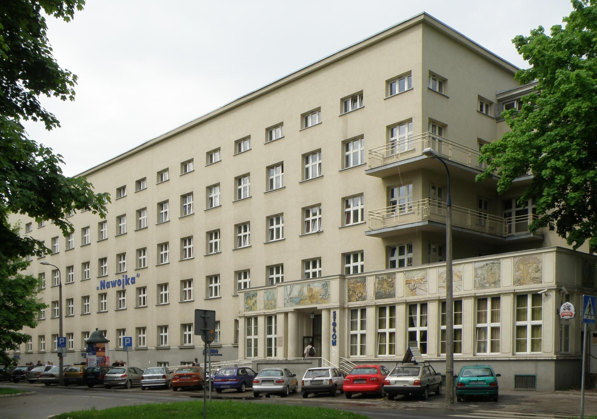 Dom Studencki Nawojka w Krakowie przy ulicy Reymonta.